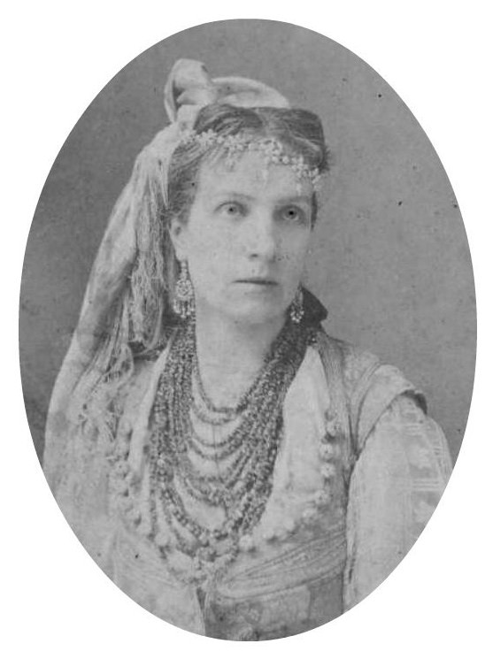 Графиня Мария Болеславовна Строганова, ур. Потоцкая (1839—1882).